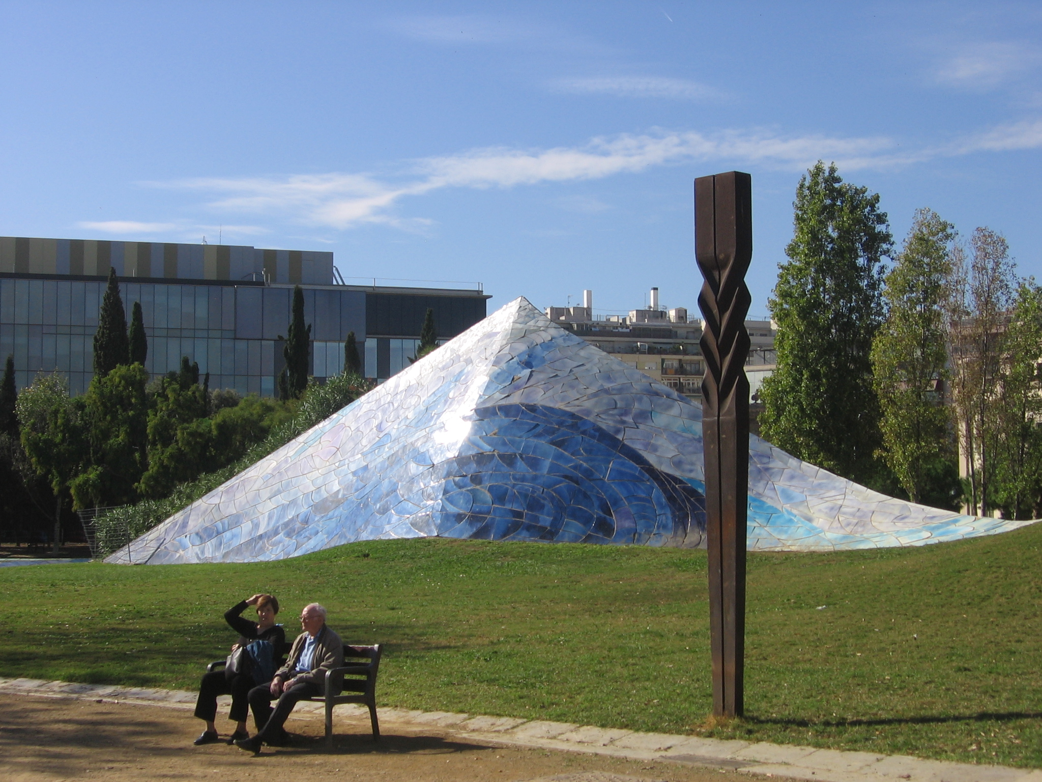 Parque de la Estación del Norte (Barcelona).